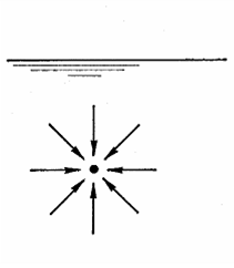 wet van pascal zelf, autocad+paint MADe 15 aug 2005 12:08 (CEST)